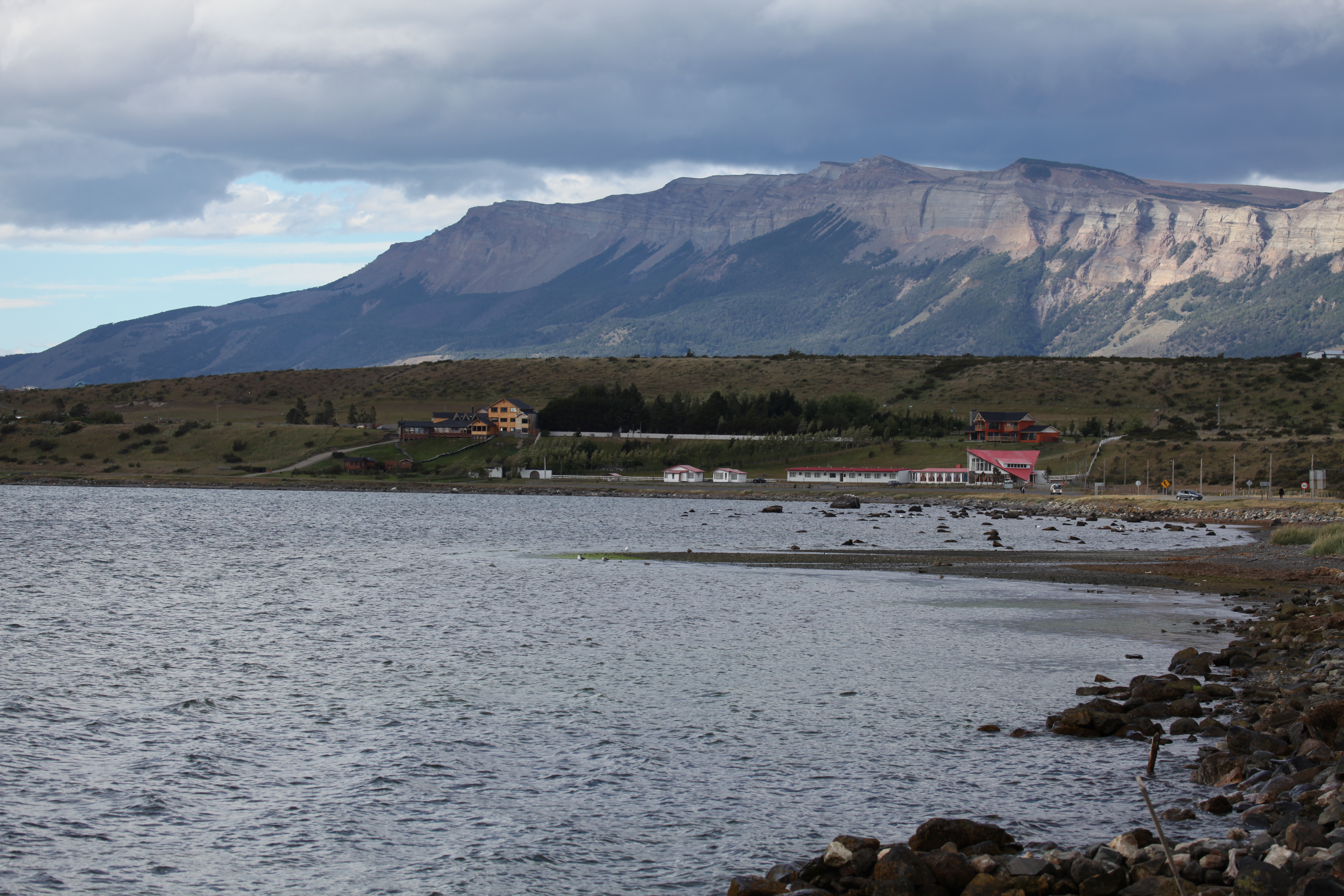 Puerto Natales harbour